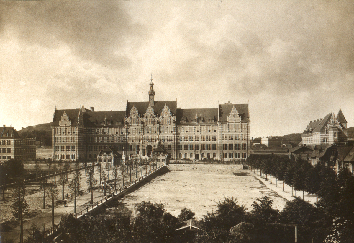 Gmach Główny Politechniki Gdańskiej i ul. Narutowicza w 1904.